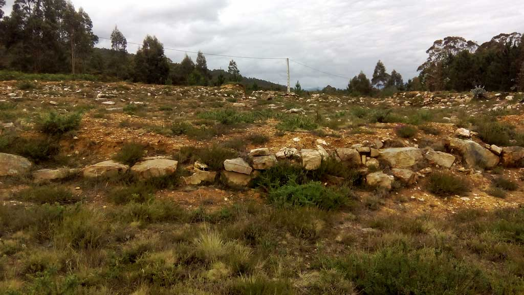 Imaxe da Roda Henge.